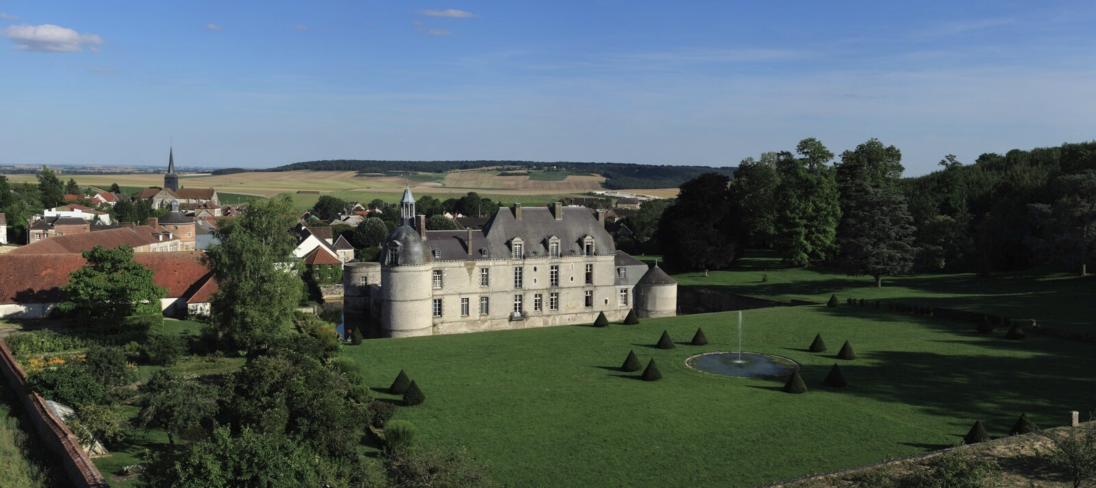 Château d'Étoges (Marne, France) reconstruit au début du XVIIe siècle sur les bases d’une forteresse. Son parc est remarquable par les sources qui émergent en de nombreux jets d’eau, alimentant des bassins et de larges douves. .